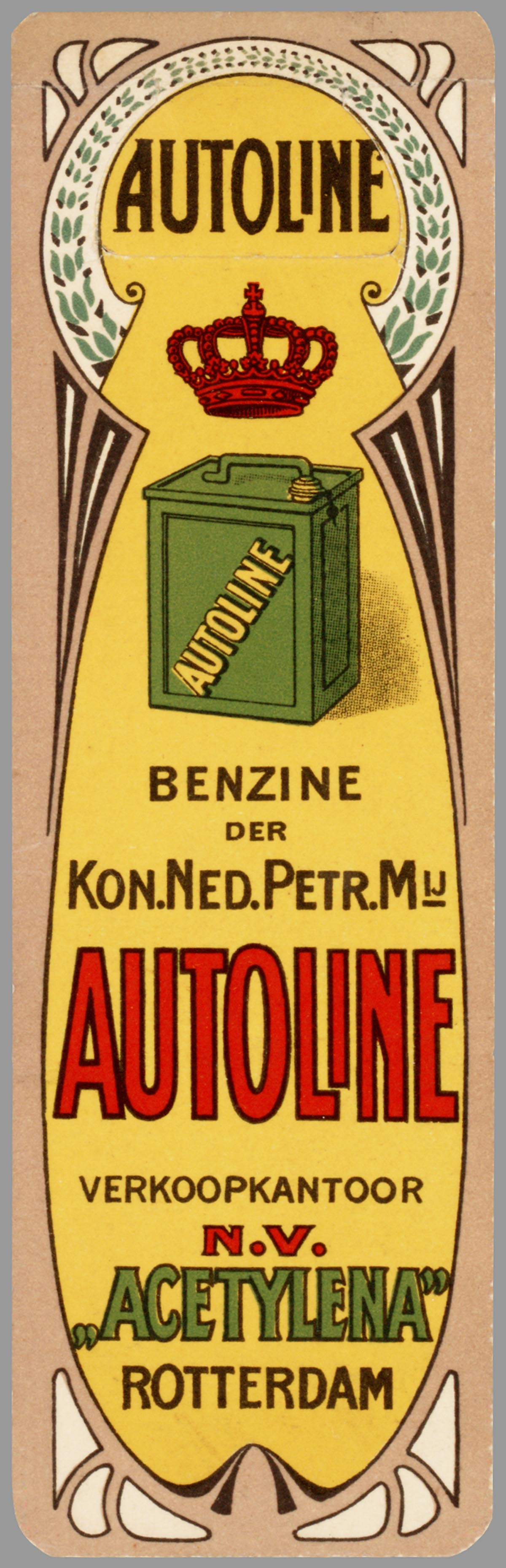 Boekenlegger: Autoline, benzine der Kon. Ned. Petr. Mij. Verkoopkantoor N.V. "Acetylena" Rotterdam. Opdrachtgever/adverteerder: Koninklijke Shell (Den Haag), Acetylena (Rotterdam).